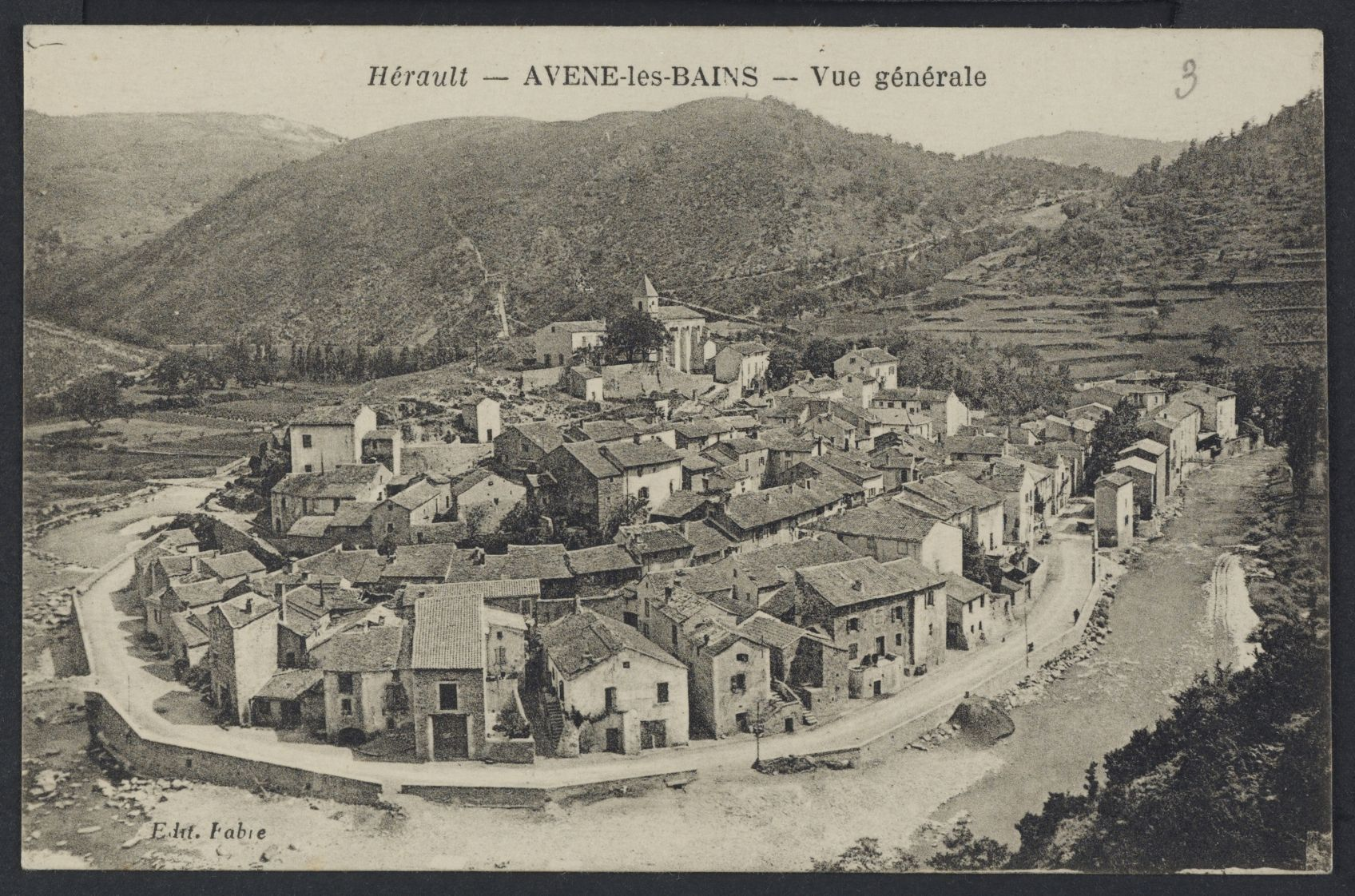 Avène-les-Bains. - Vue générale : carte postale